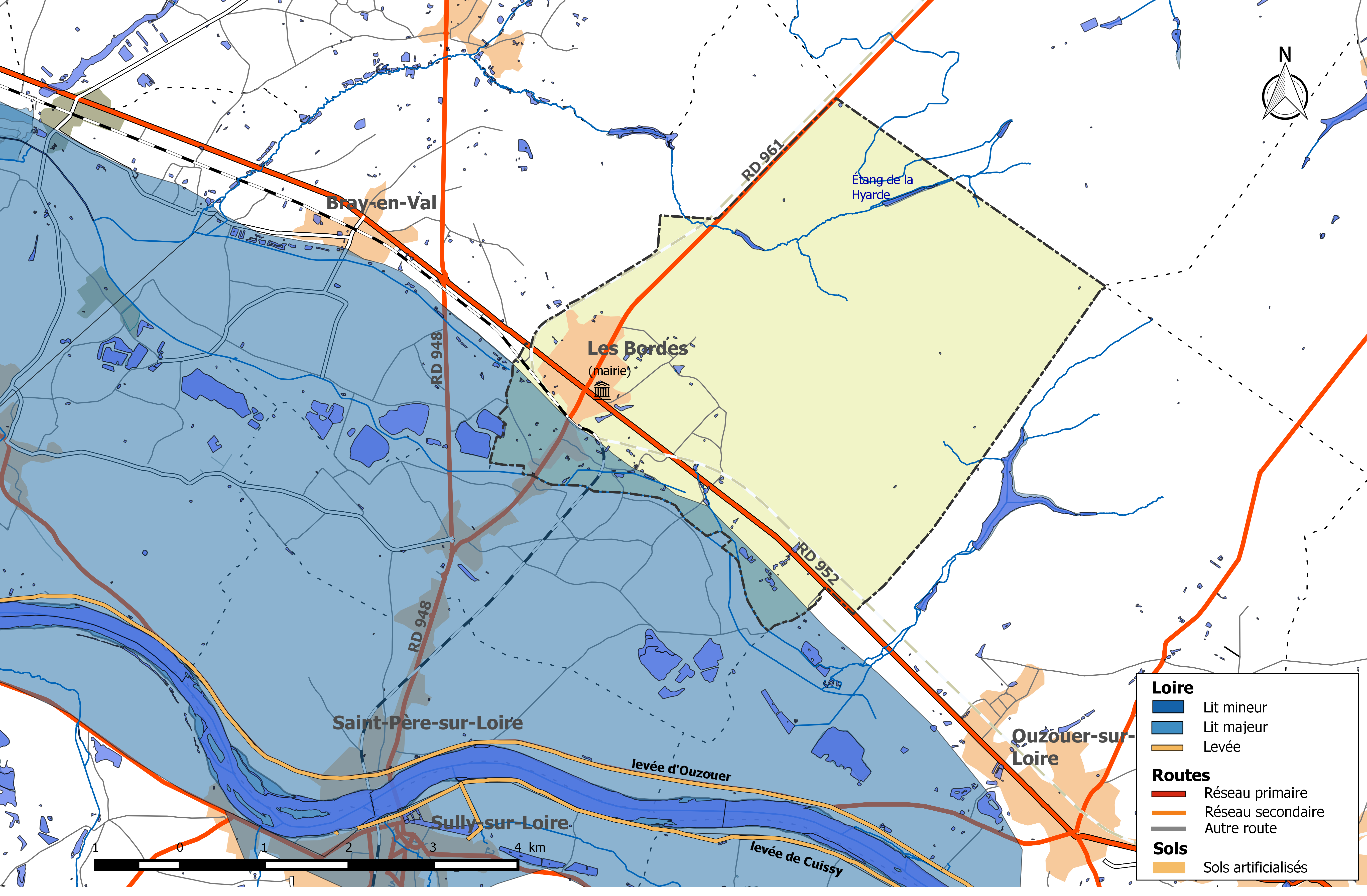 Zone inondable et réseaux hydrographique et routier de la commune des Bordes.